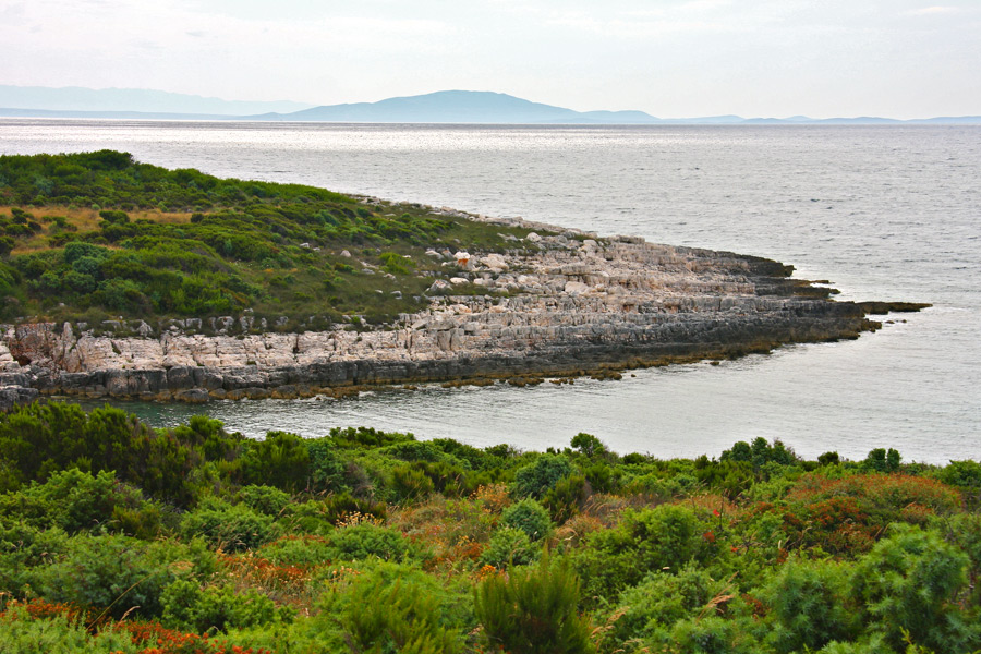 Rt Kamenjak